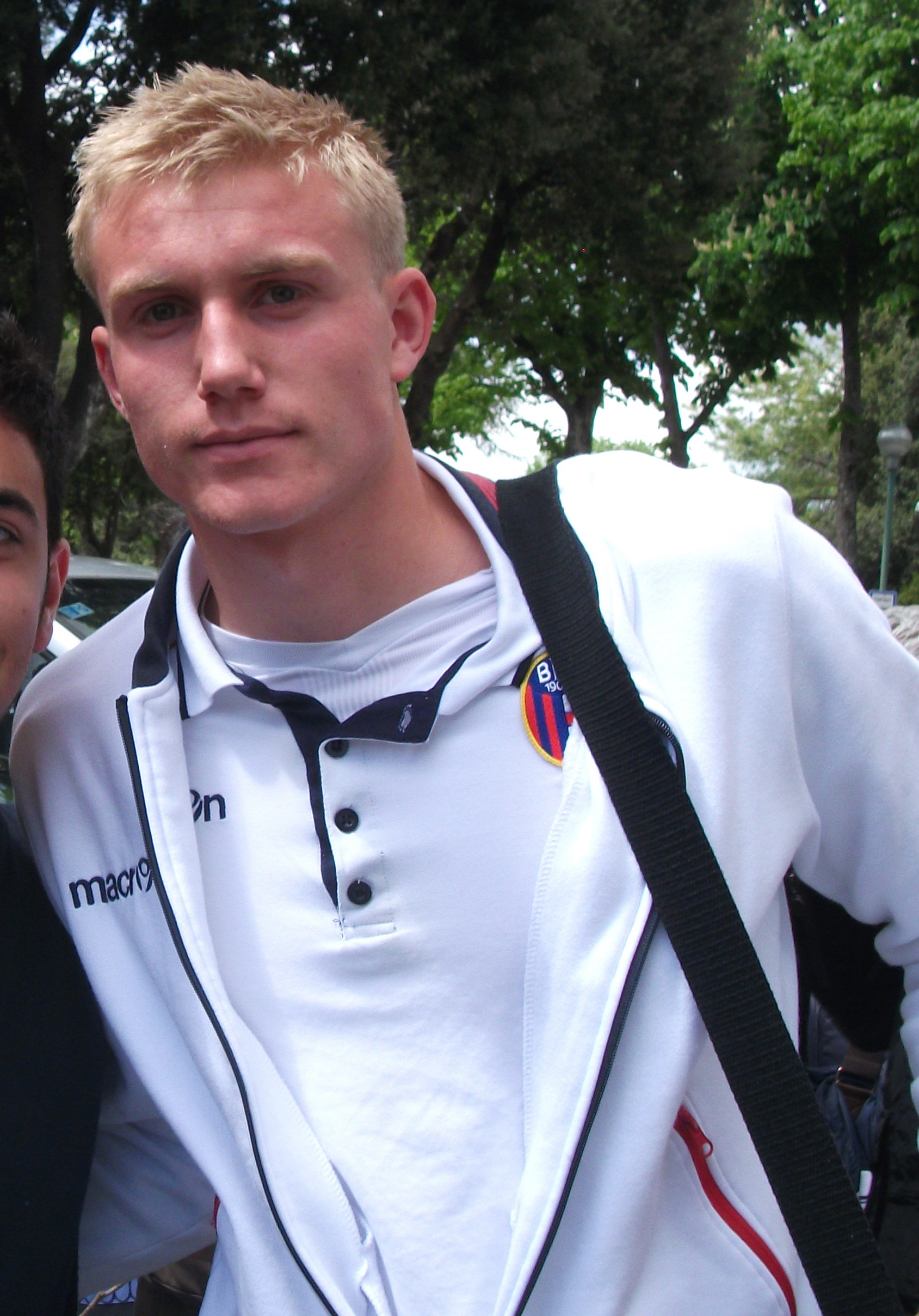 Il calciatore danese Frederik Sørensen prima della partita di Serie A 2011-12, Siena vs Bologna, 25 aprile 2012.